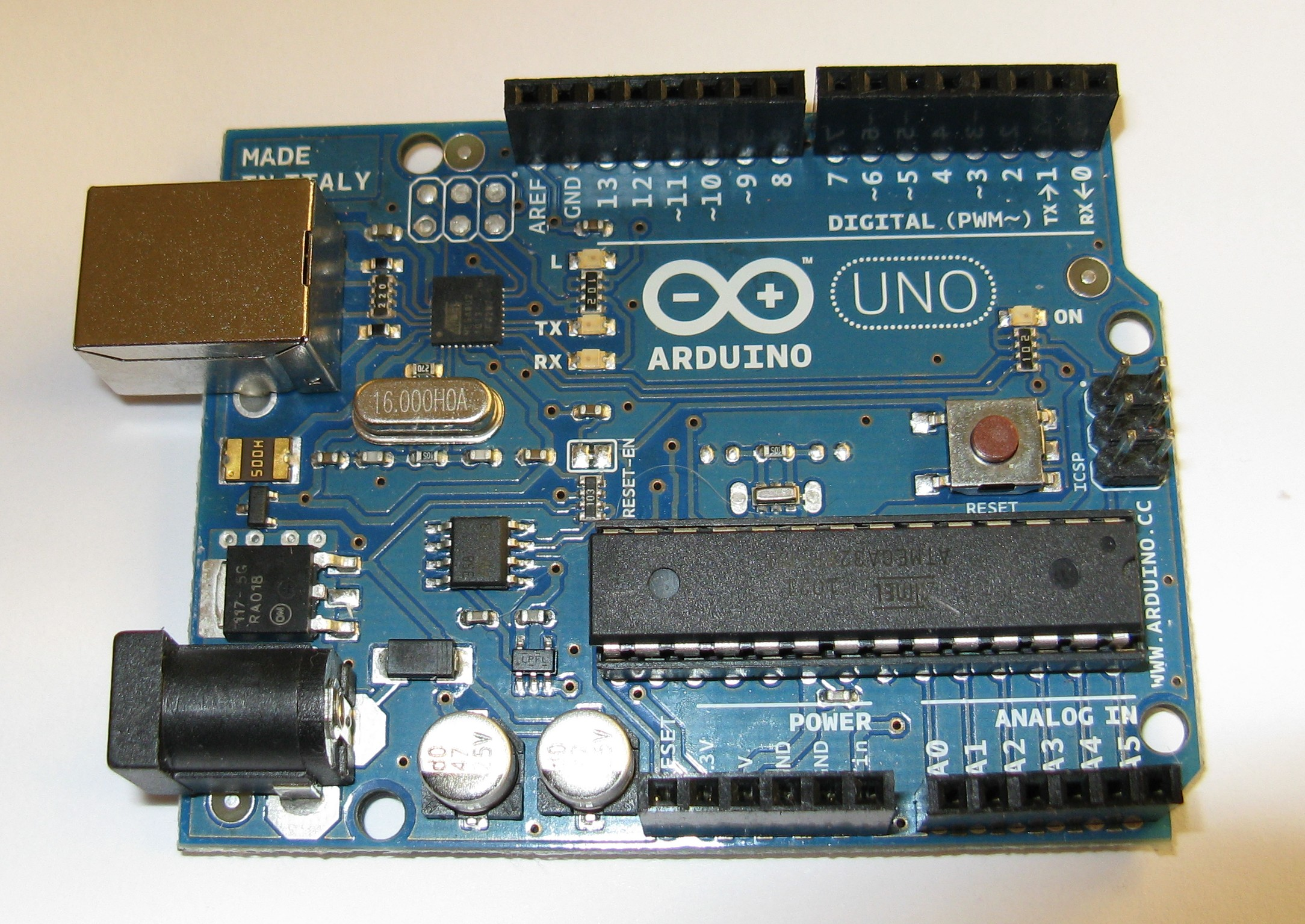 Vista d'insieme di una scheda Arduino Uno